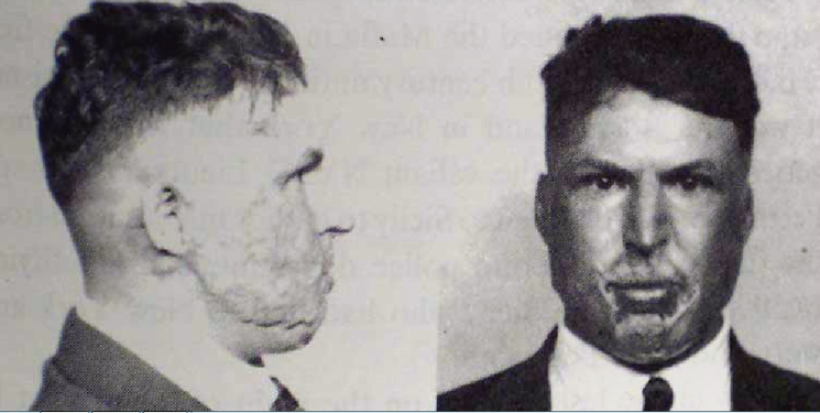 Joseph „Joe Scarface“ DiGiovanni - Mugshot